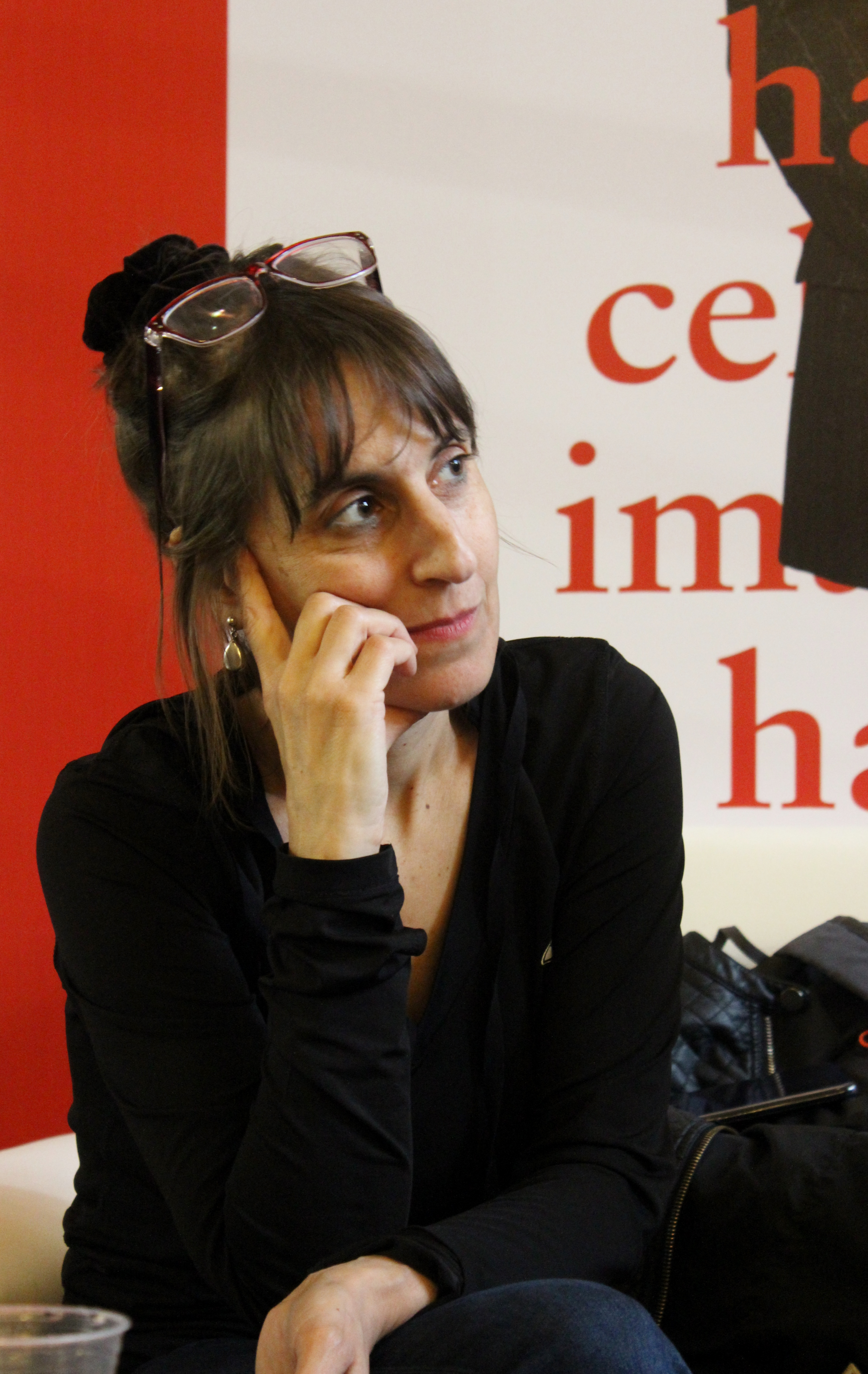 La escritora chilena Alejandra Costamagna en la Feria Internacional del Libro de Santiago 2018.